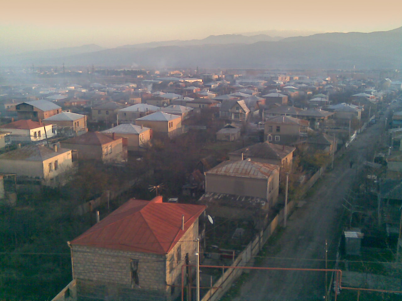 ხაშურის ერთერთი უბანი